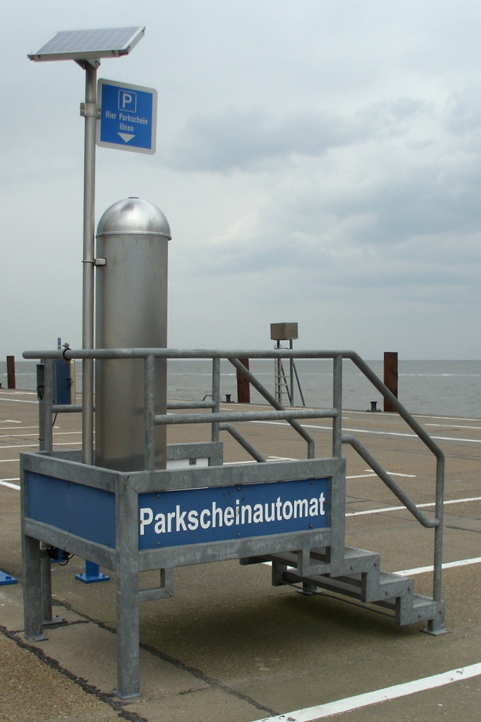 Parkscheinautomat in Nordfriesland